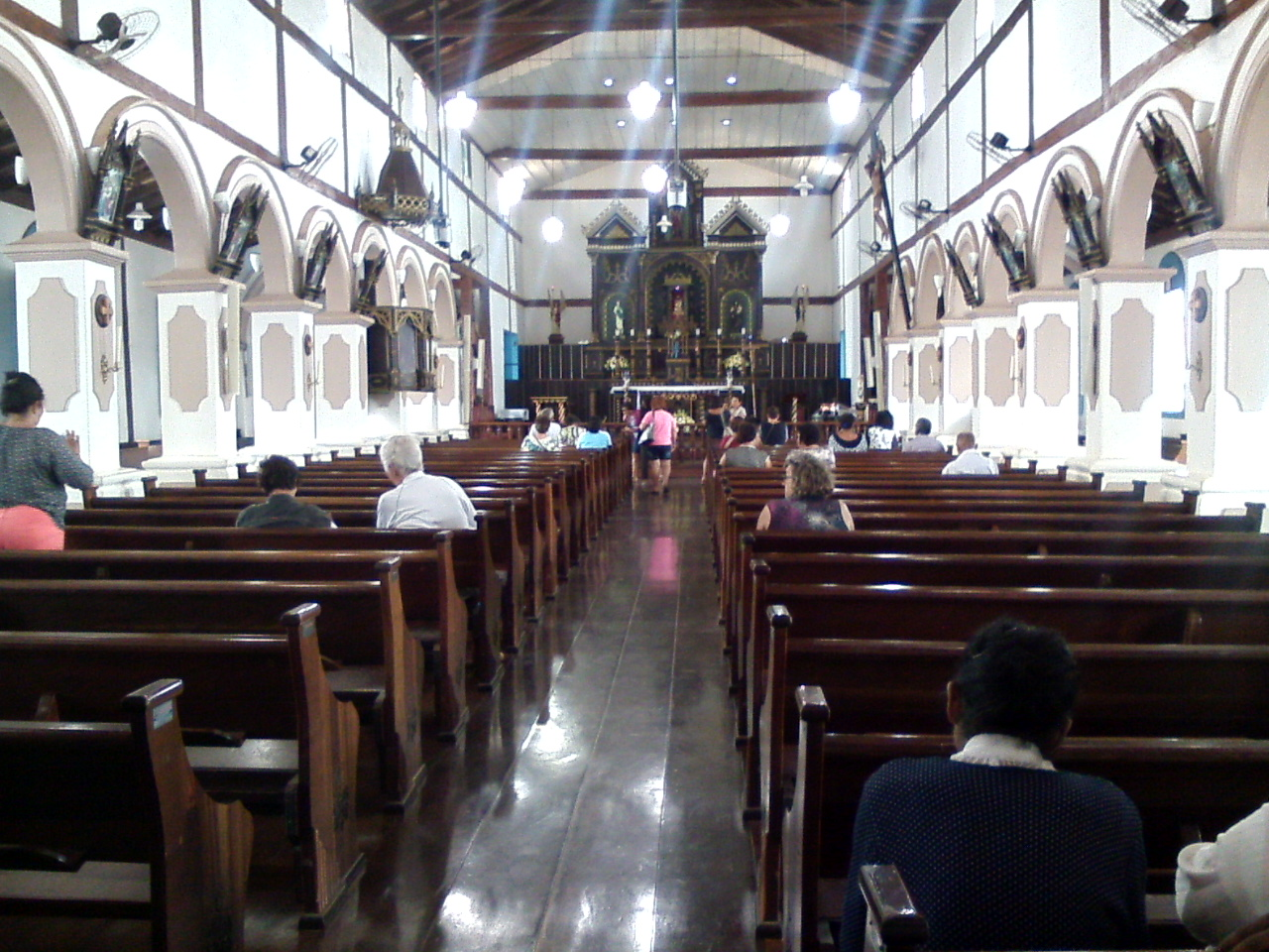 Nave da Igreja Matriz de Trindade, em Goiás.